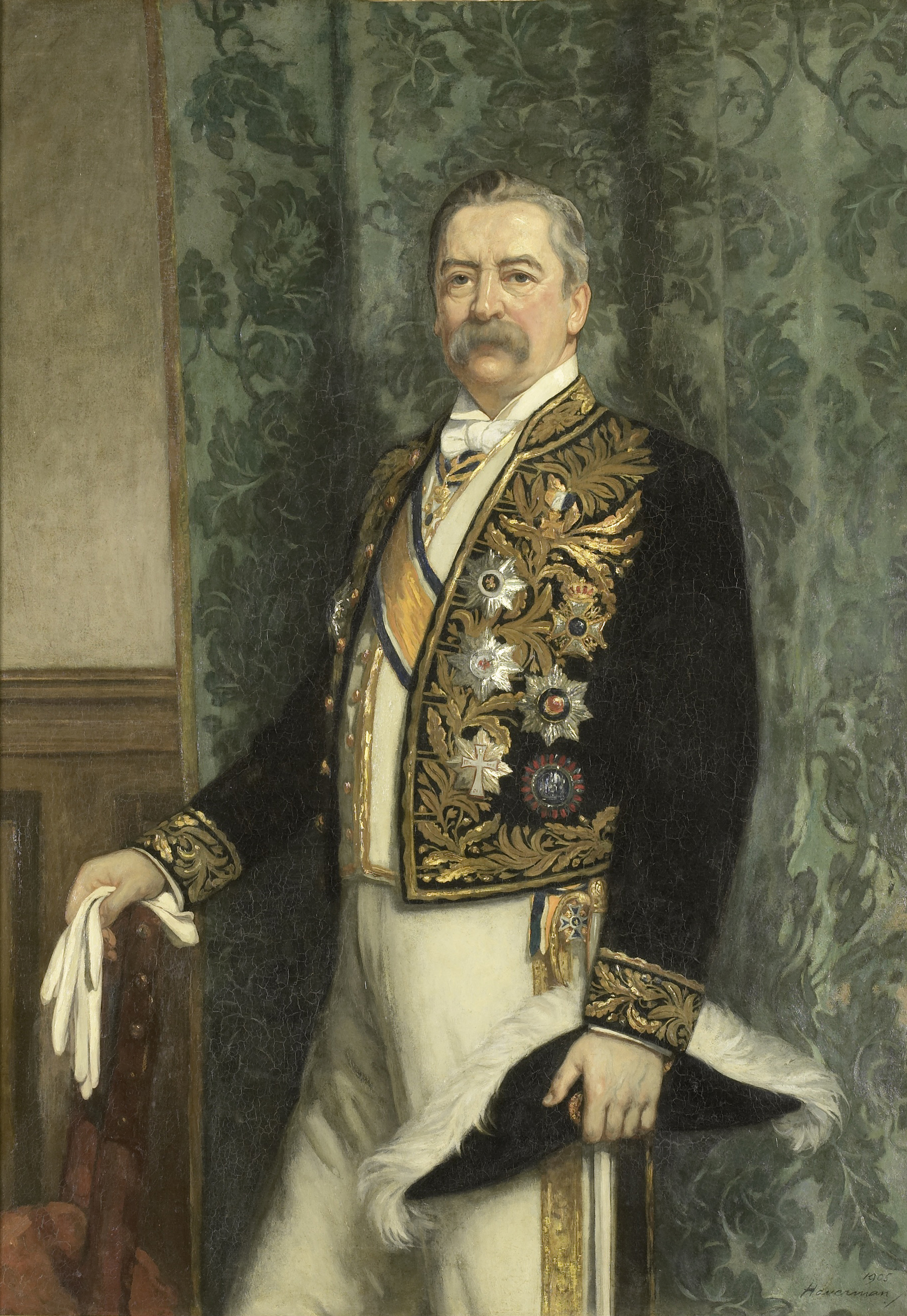 Portret van Willem Rooseboom (1843-1920). Gouverneur-generaal (1899-1904). Kniestuk, staande naar links, het gelaat naar de beschouwer gekeerd. Handschoenen in de rechterhand die rust op de leuning van de stoel, de steek in de linkerhand. Onderdeel van een reeks van portretten van de gouverneurs-generaal van het voormalige Nederlands Oost-Indië. Collection: schilderijen; Gouverneurs-generaal serie